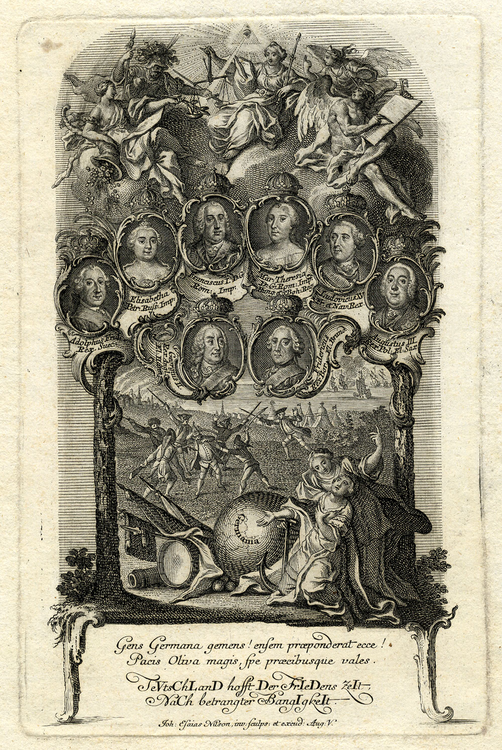 Die am Hubertusburger Frieden 1763 beteiligten Fürsten, Kupferstich 18. Jh.